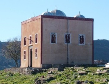 Mausolée de Sidi Hend Oulefki dans le village de Taka (commune d'Aït Yahia) en Kabylie (Wilaya de Tizi Ouzou, Algérie).